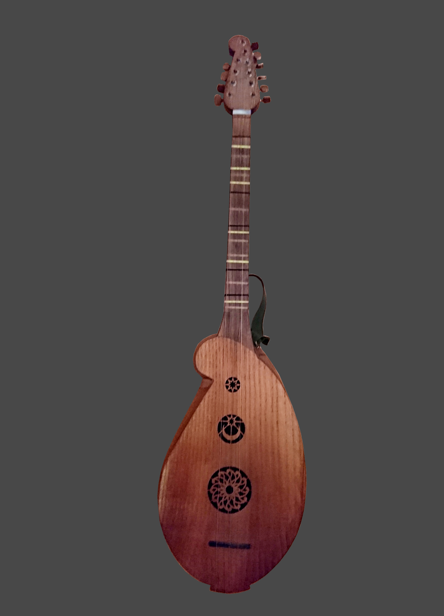 Azərbaycanın milli mizrablı-simli musiqi aləti